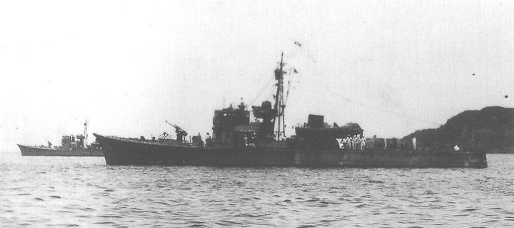 日本海軍第十三号型駆潜艇 『第十四号駆潜艇』（手前）、『第十三号駆潜艇』（左奥）、館山湾